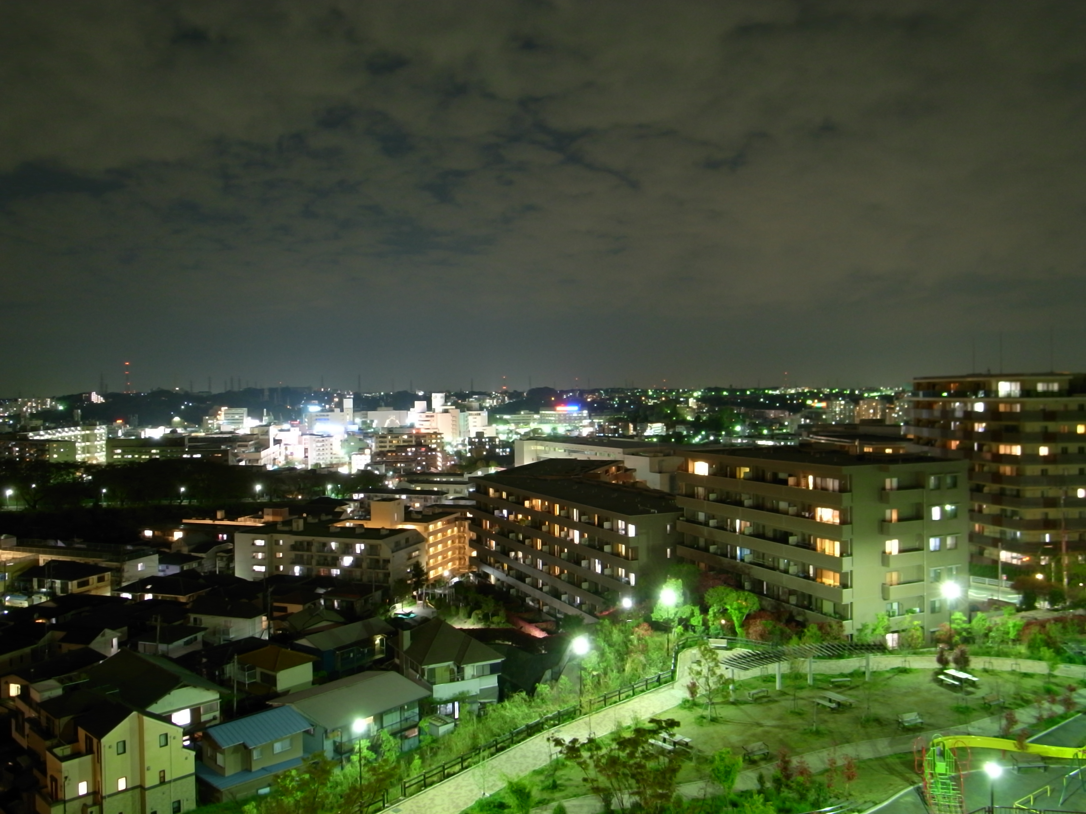 Yokohama Totsuka Night View / 横浜 戸塚 夜景